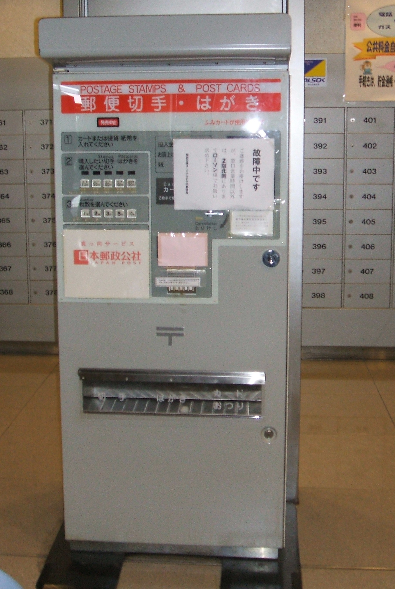 日本の切手自動販売機（関西国際空港内郵便局内で撮影）